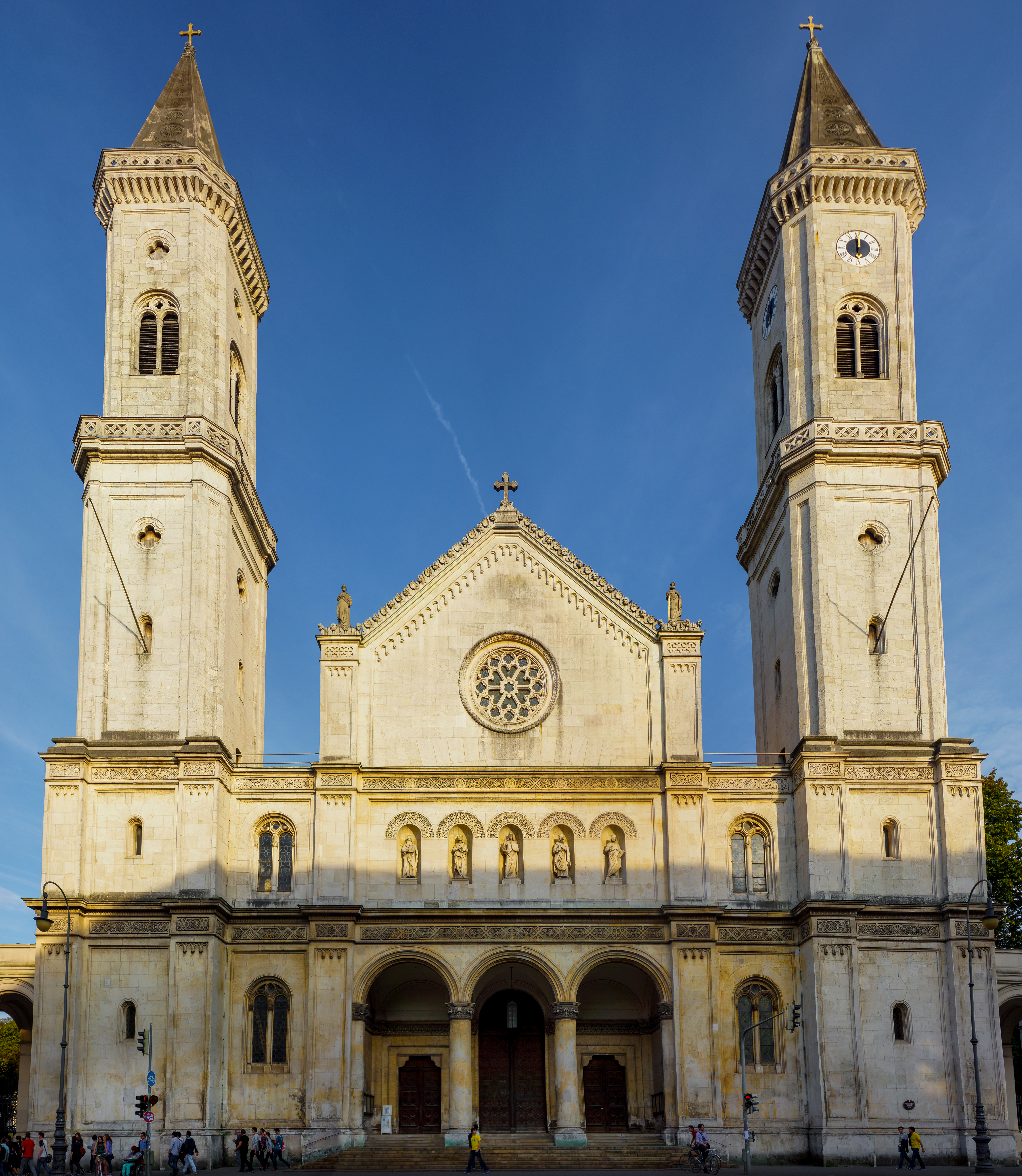 München, Kirche St. Ludwig in der Ludwigstraße.This is a photograph of an architectural monument.